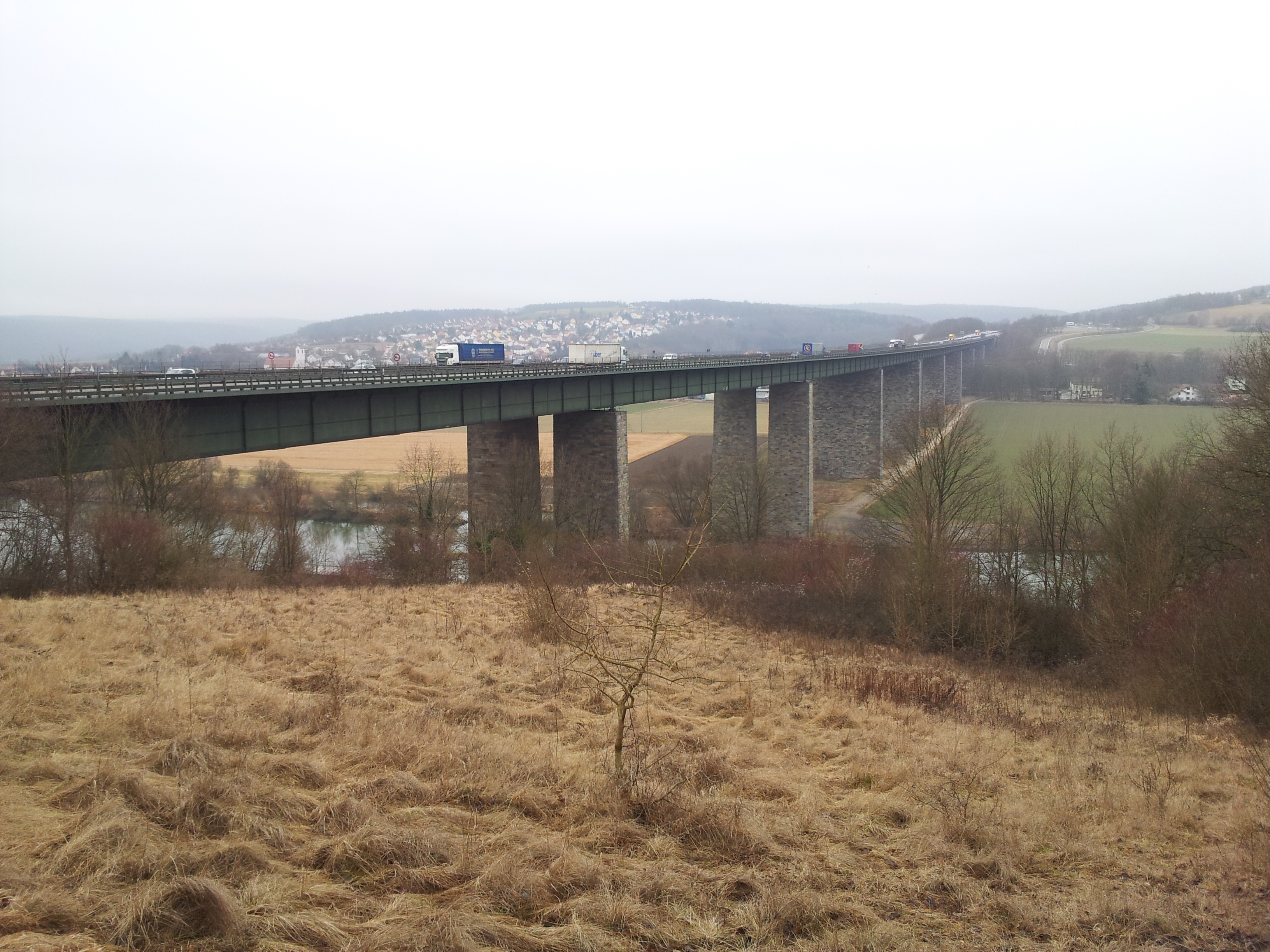 Donaubrücke Sinzing der Bundesautobahn 3 bei Regensburg